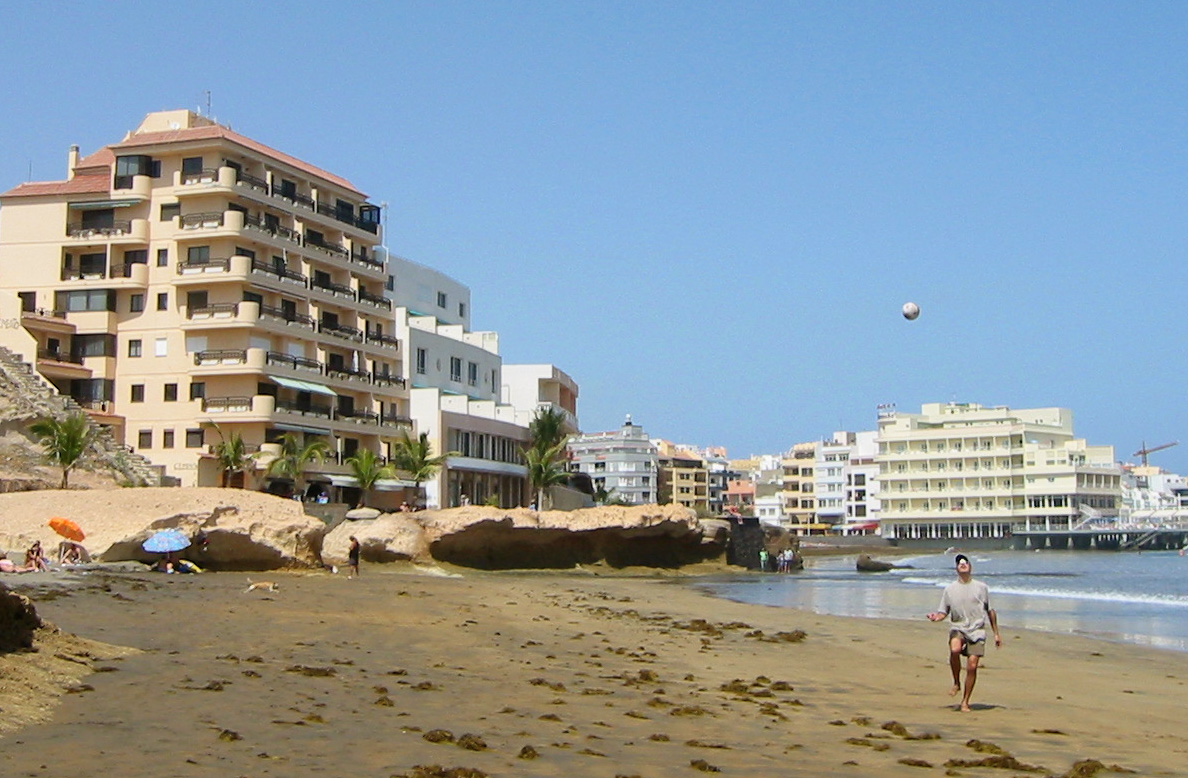 Playa de El Médano056